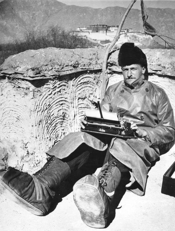 Tibetexpedition, Beger mit Schreibmaschine Lhasa, Beger mit Schreibmaschine auf dem Dach unseres Hauses [Im Hintergrund Potala] Abgebildete Personen: Beger, Bruno Dr.: SS-Hauptsturmführer, Abteilungsleiter Sven-Hedin-Institut, Deutschland (GND 128720654)